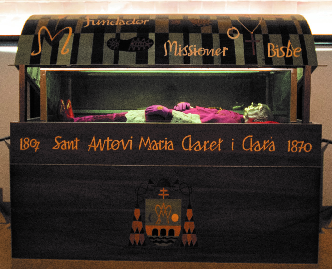 Actual sepulcro del Santo en la cripta del Templo de San Antonio María Claret, en Vic.